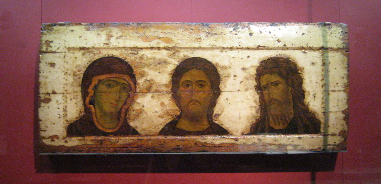 Deesis from Dormition Cathedral in Moscow ДЕИСУС. Первая треть XIII века. Владимиро-Суздальская Русь (?). Дерево; темпера. 61,5 х 146,5. Поступил в 1936 году. Находился в Успенском соборе Московского Кремля, где помещался на южной стене, над гробницей митрополита Филиппа. Реставрация начата в 1935 году в Государственной Оружейной палате, продолжена и завершена в 1936 в ГТГ И.А. Барановым. ГТГ. инв. ДР-1191